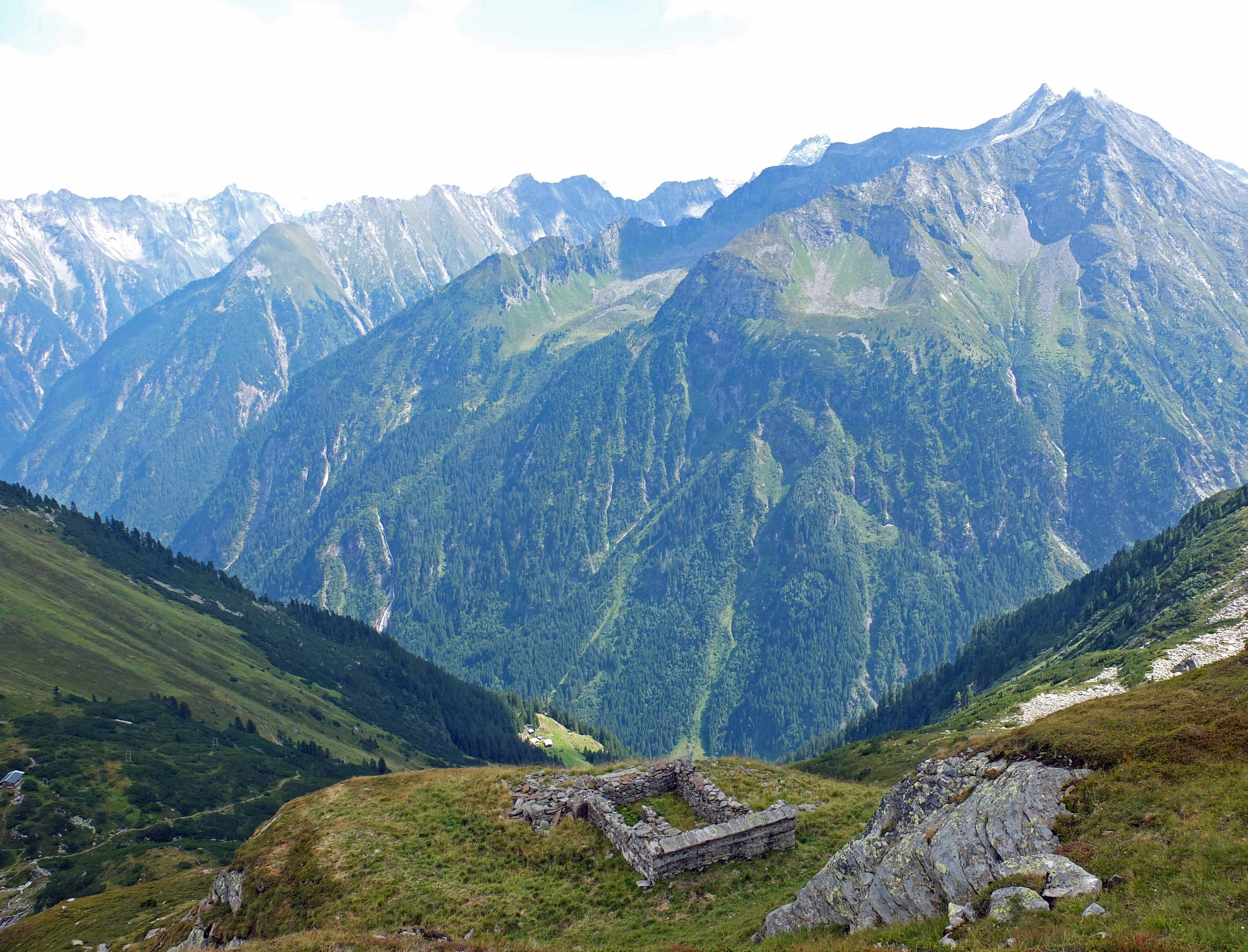 Grundmauern der Rifflerhütte, links am Bildrand die Kesselalm am Berliner Höhenweg. Weiter bergab, sonnenbeschienen, die Birglbergalm. Gegenüber, auf der anderen Seite des Zemmtals, blickt man auf den Großen Igent